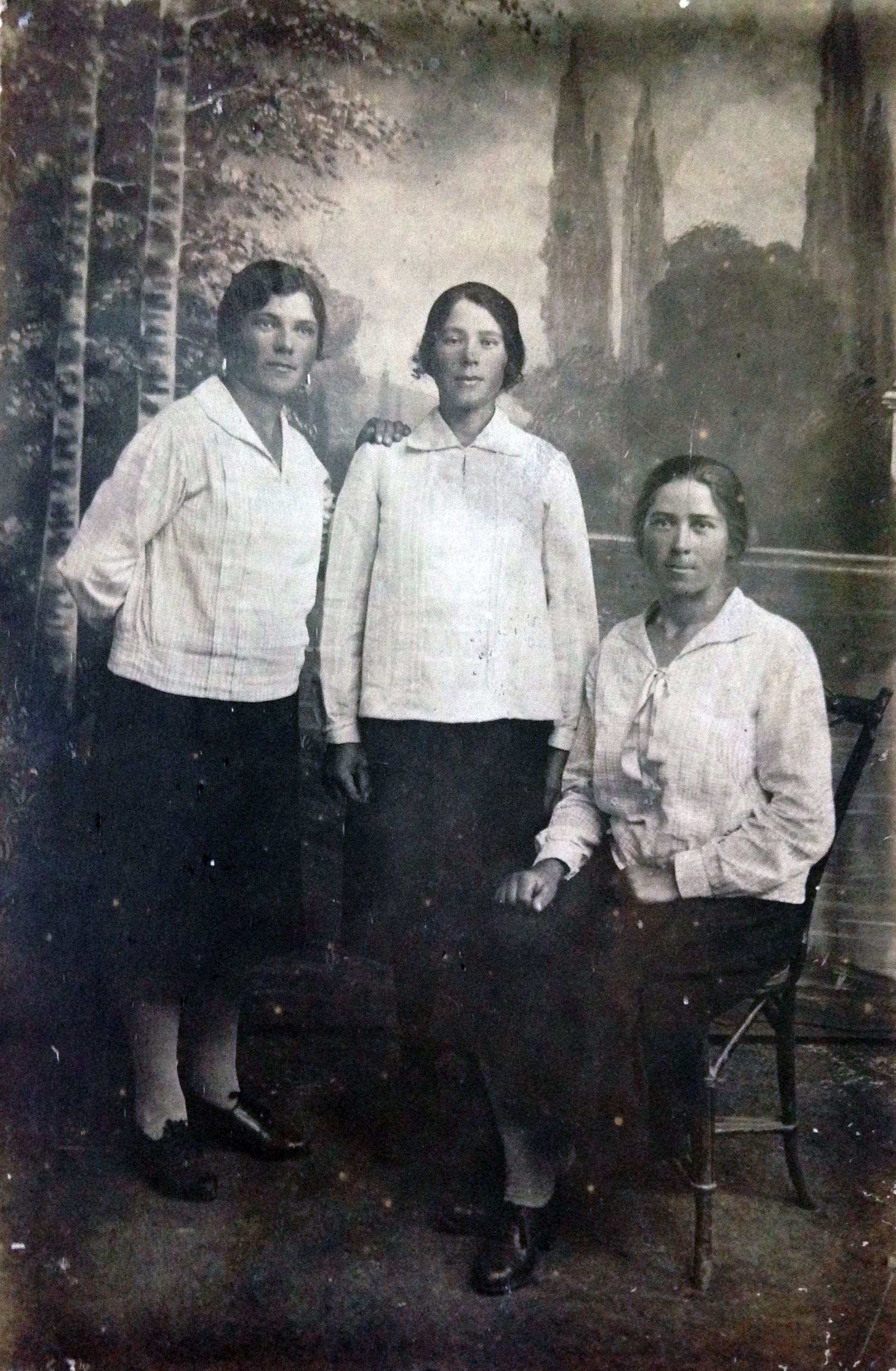 Сестри Козачинські Севастянівка